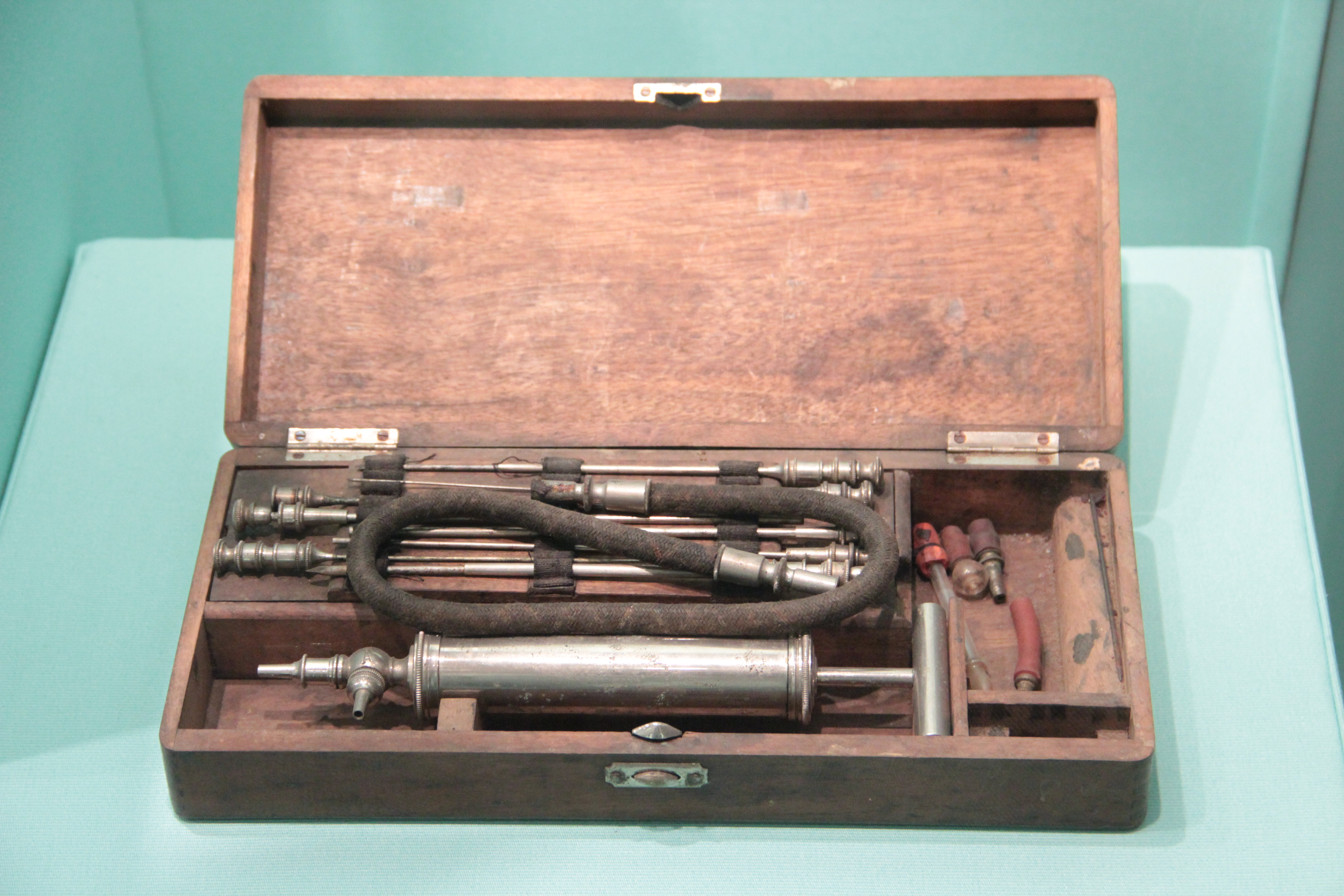 Pleuro-laveur. Était utilisé dans le traitement de le pleurésie purulente. Fin XIXe - début XXe siècle. Museum of Medical Instruments of the Hospital of Toulouse Native nameMusée des Instruments de Médecine des Hôpitaux de ToulouseParent institutionHôpitaux de ToulouseLocationToulouse, FranceCoordinates43° 35′ 58″ N, 1° 26′ 12″ E Established2004 Authority control : Q3330252 institution QS:P195,Q3330252